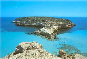 Foto da me scattata il 25/03/02 a Lampedusa